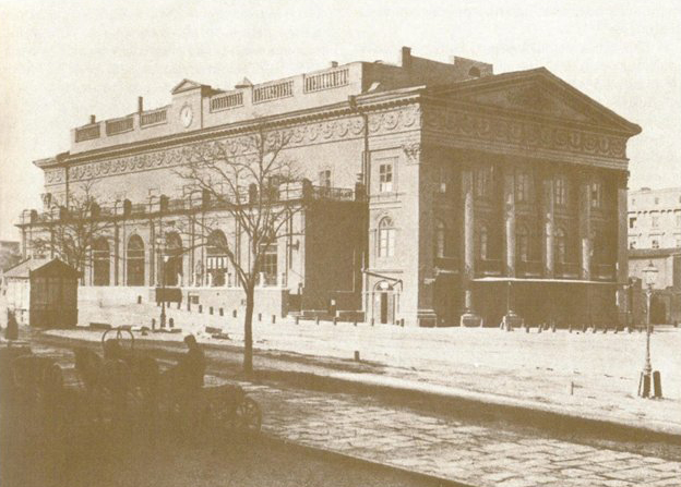 Перший одеський оперний театр (1809-1873), після реконструкції 1836 року: фото